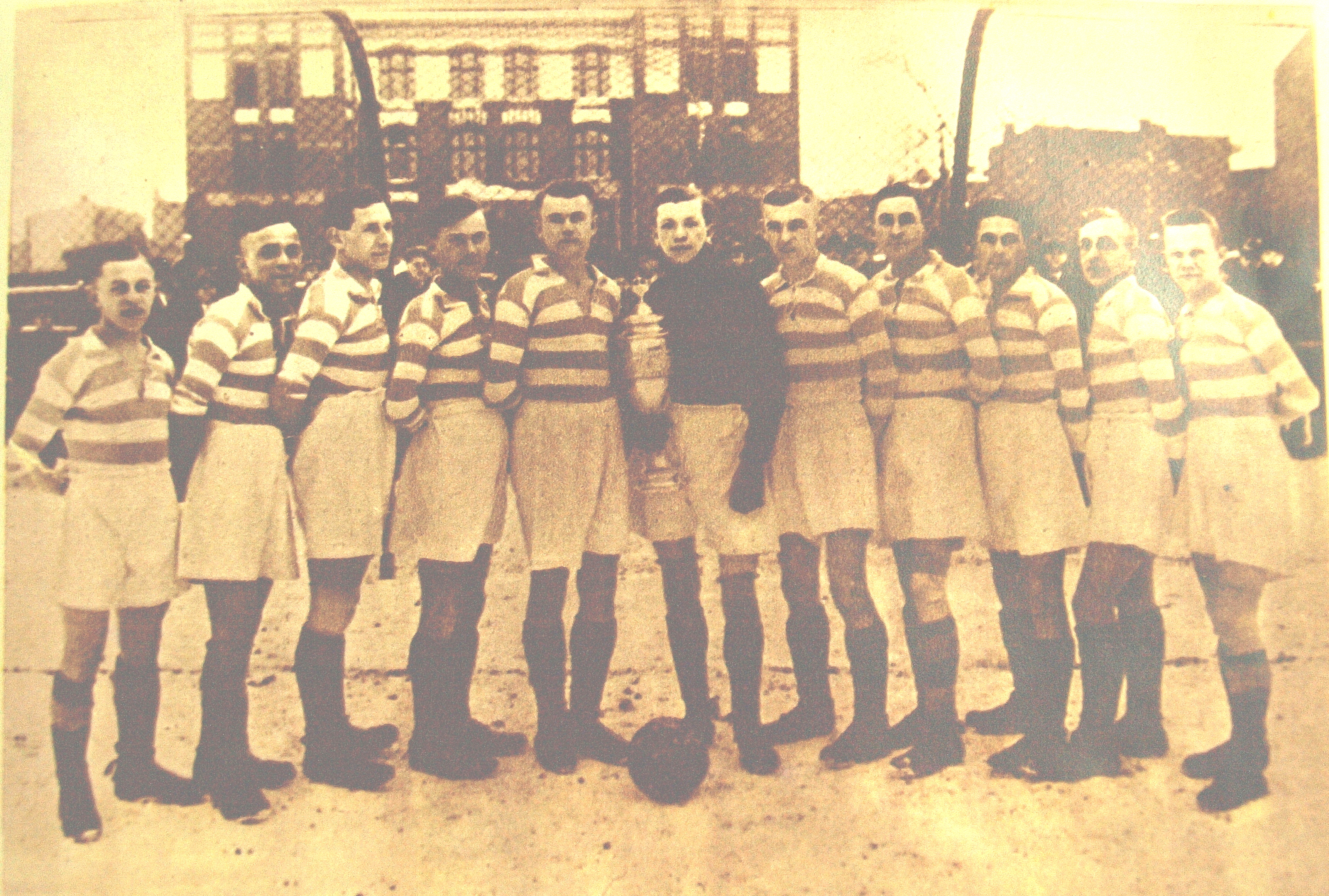 Drużyna Ruchu Wielkie Hajduki w 1927